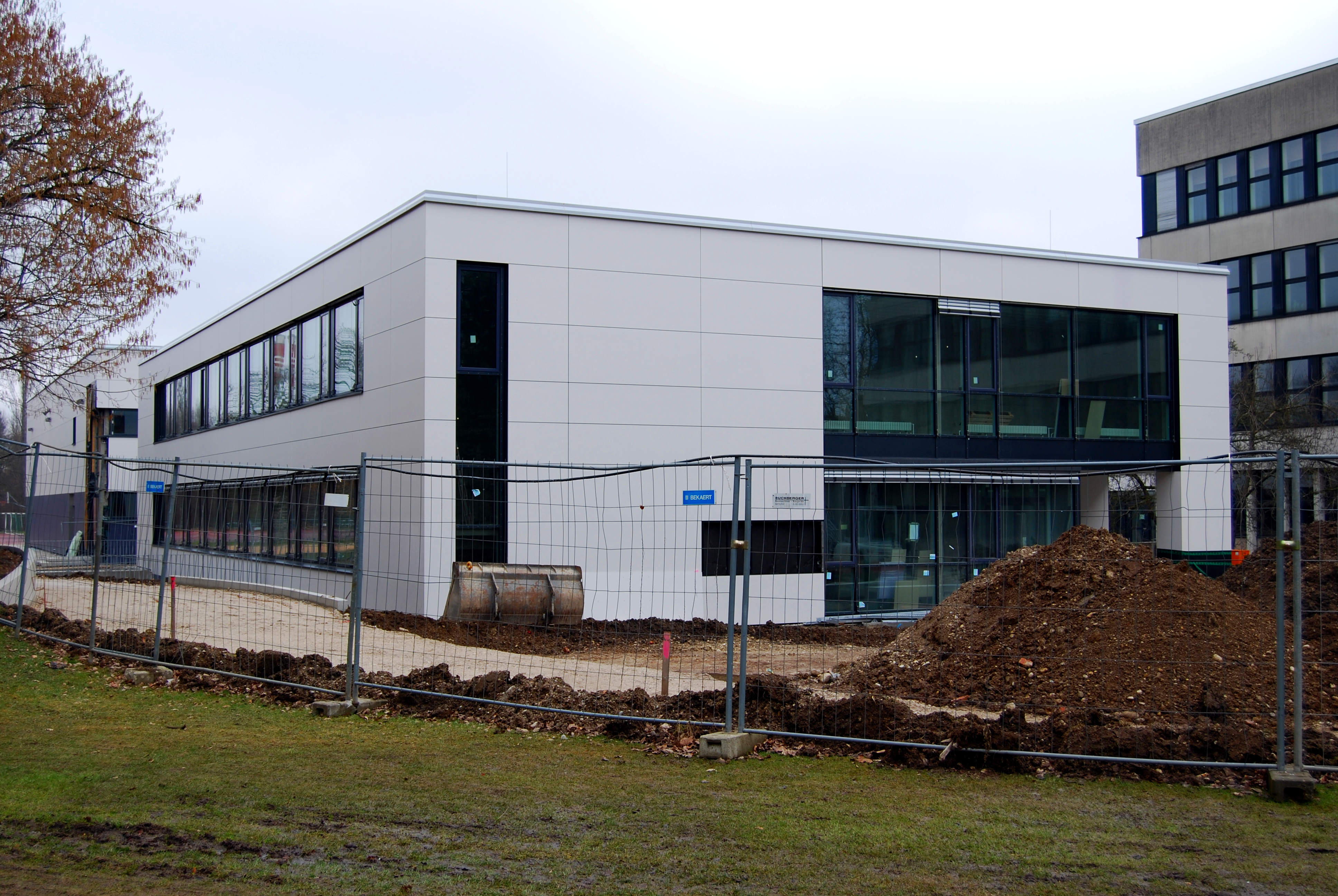 Erweiterungsbau des Wilhelm-Hausenstein-Gymnasiums in München-Bogenhausen